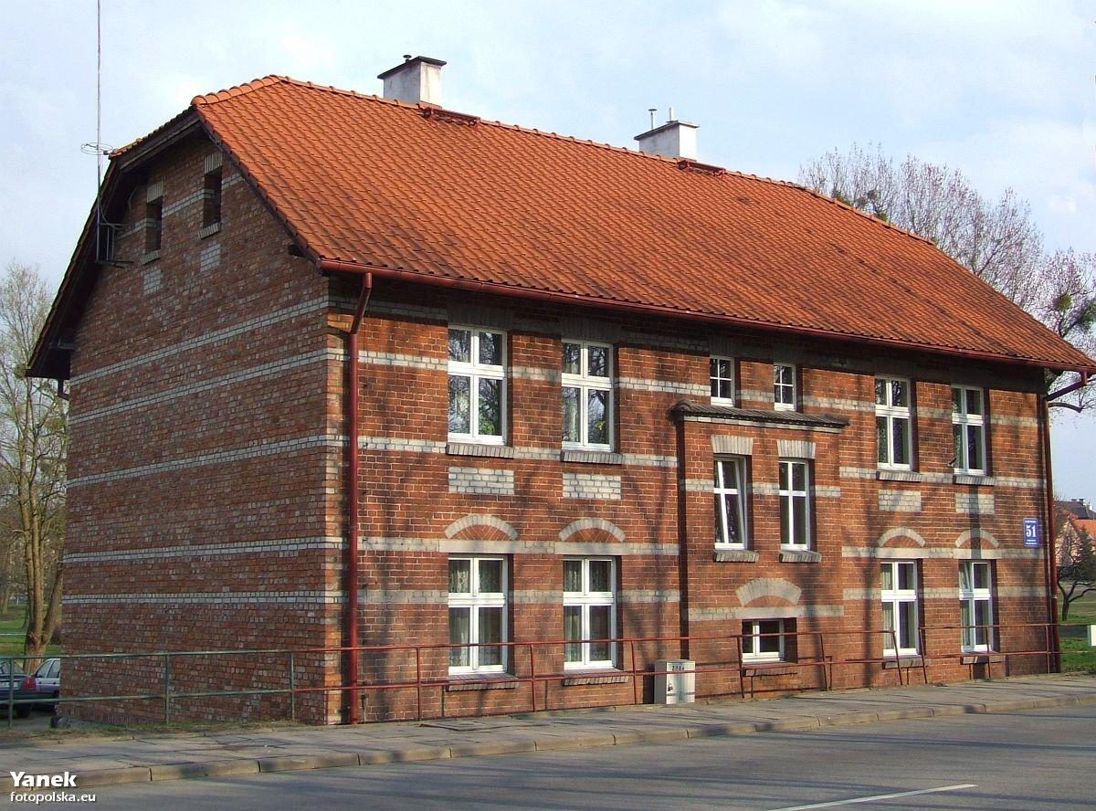 Dom widziany od strony płn.-zachodniej.